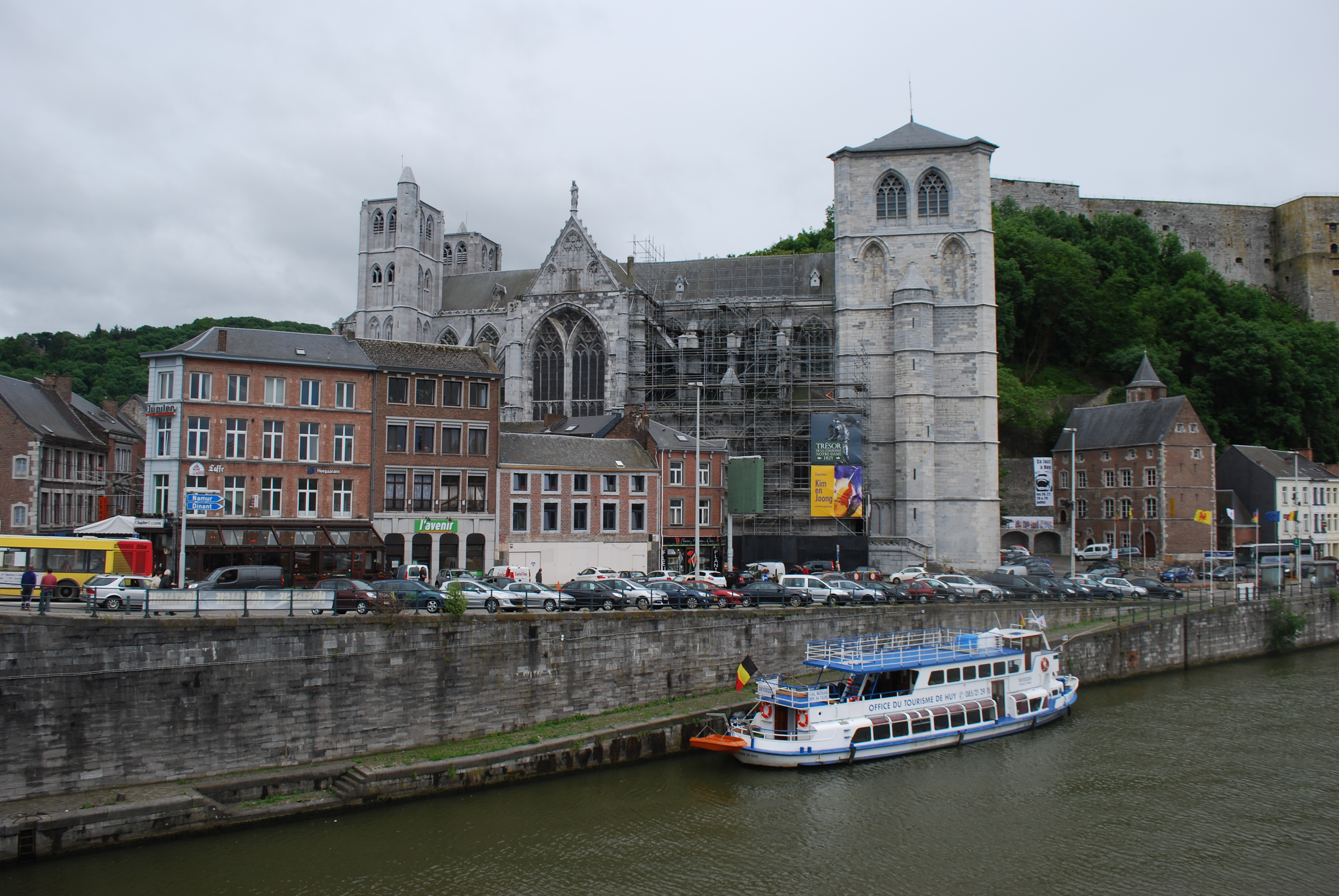 Vue de quai de Namur à Huy : la collégiale et la citadelle.